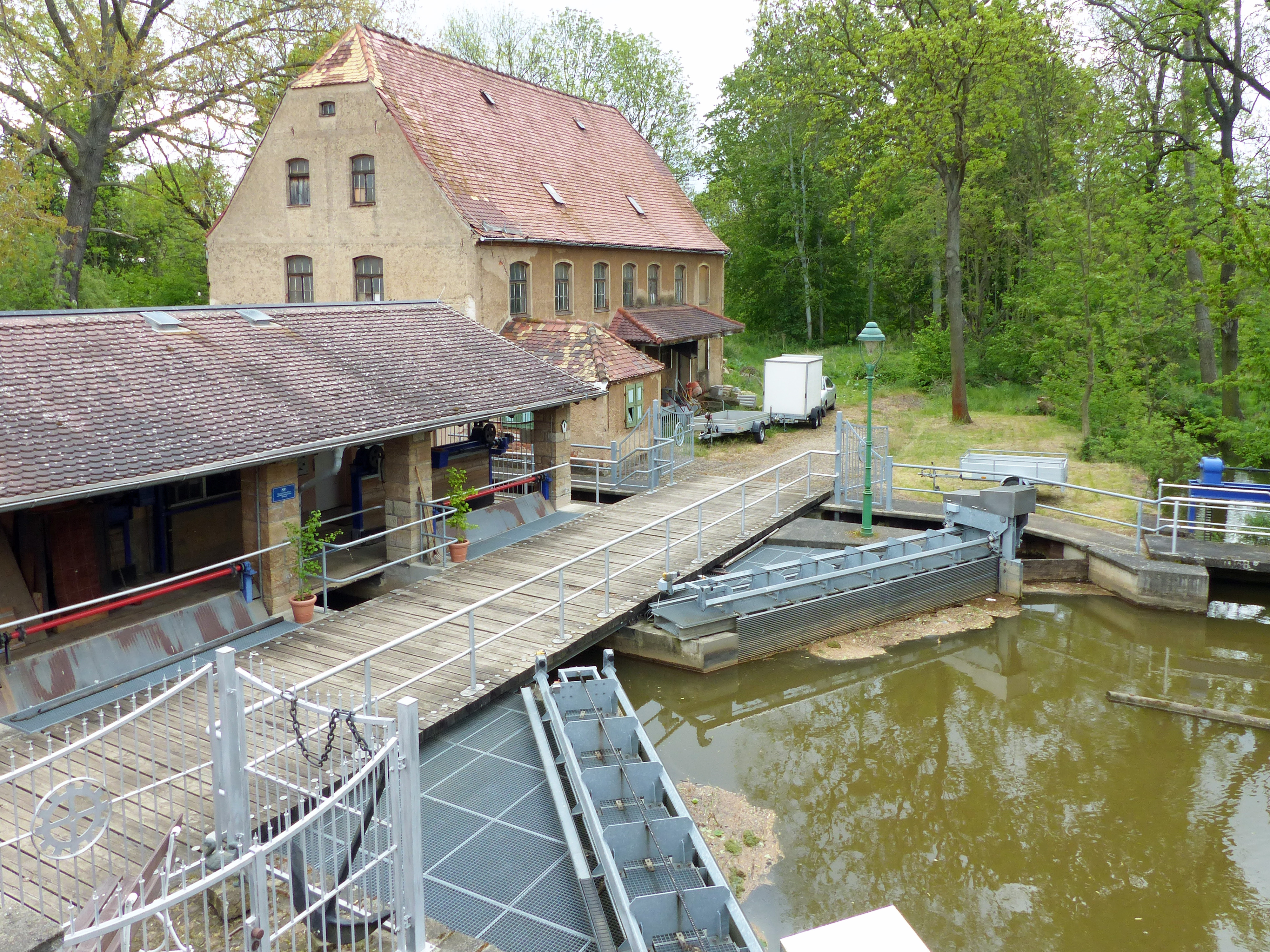 Wasserkraftanlage der denkmalgeschützten Eisenmühle in Eltertrebnitz, OT Oderwitz